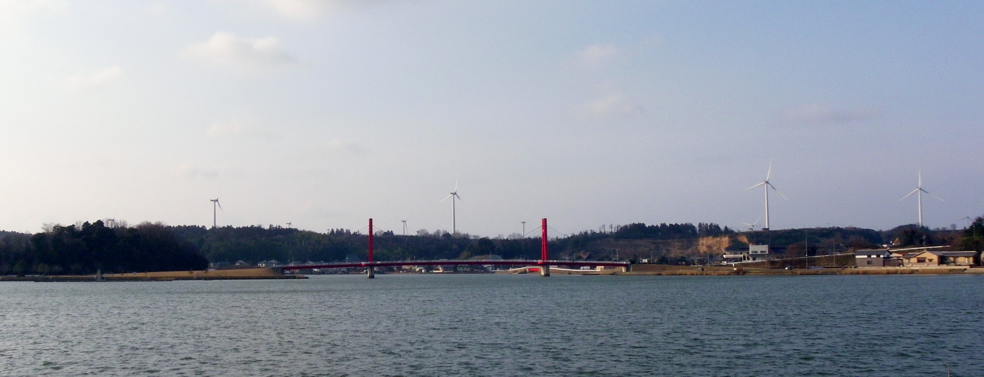 アイリスブリッジとあわら北潟風力発電所